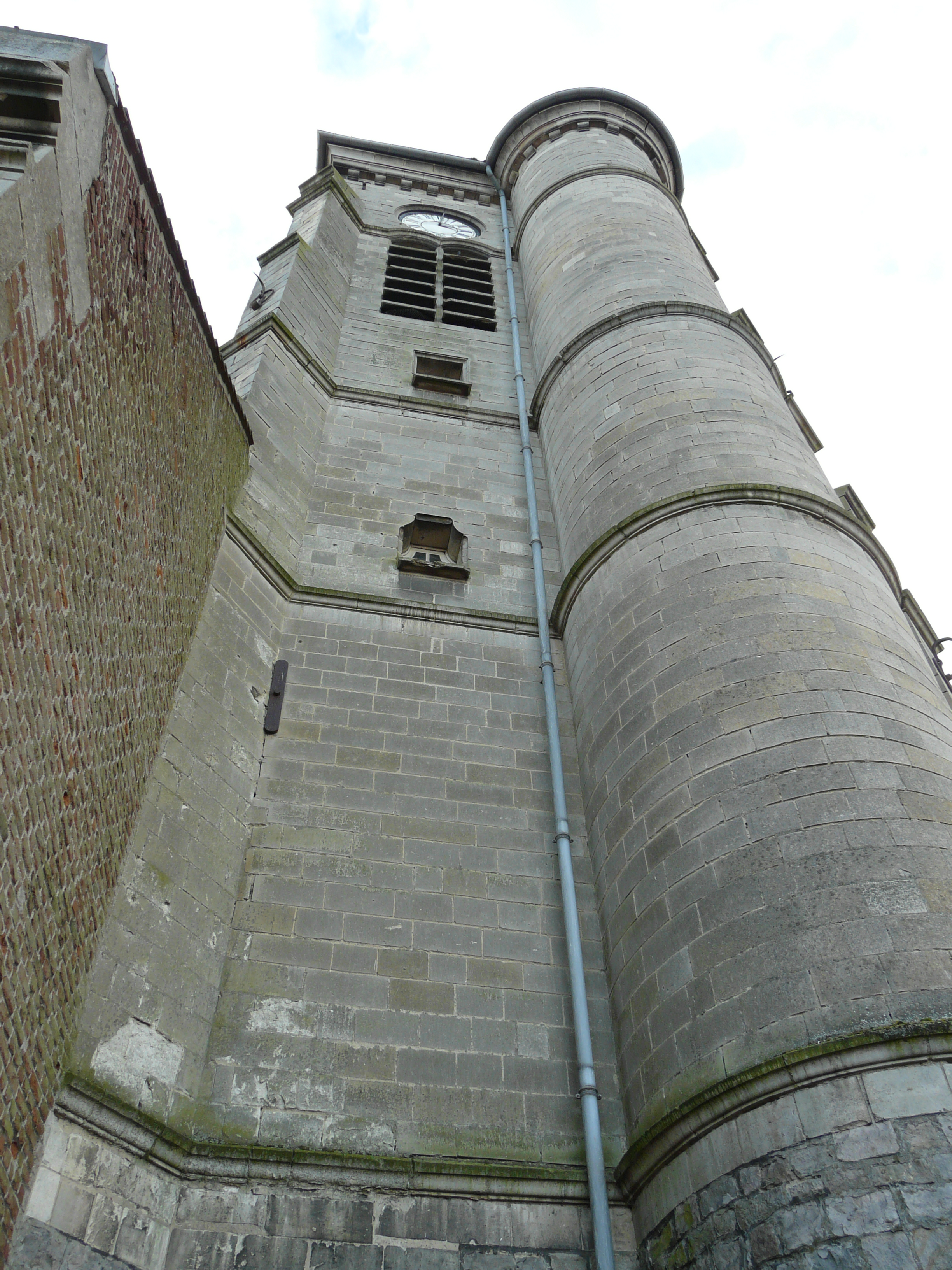 L'église de Bantigny (Nord), clocher